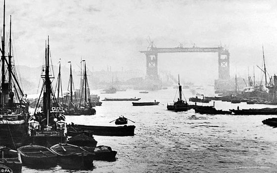 Строительство Тауэрского моста